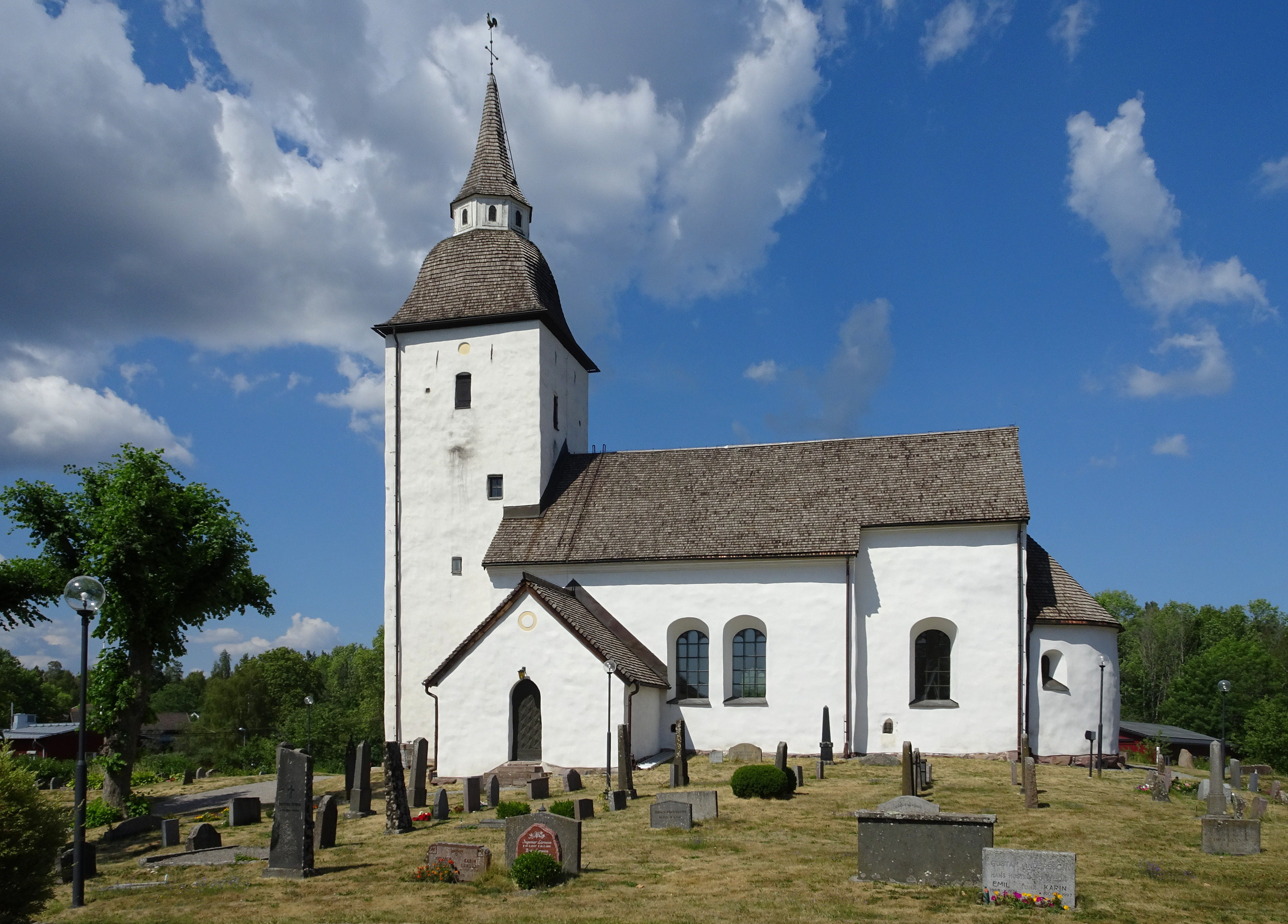 Ytterenhörna kyrka